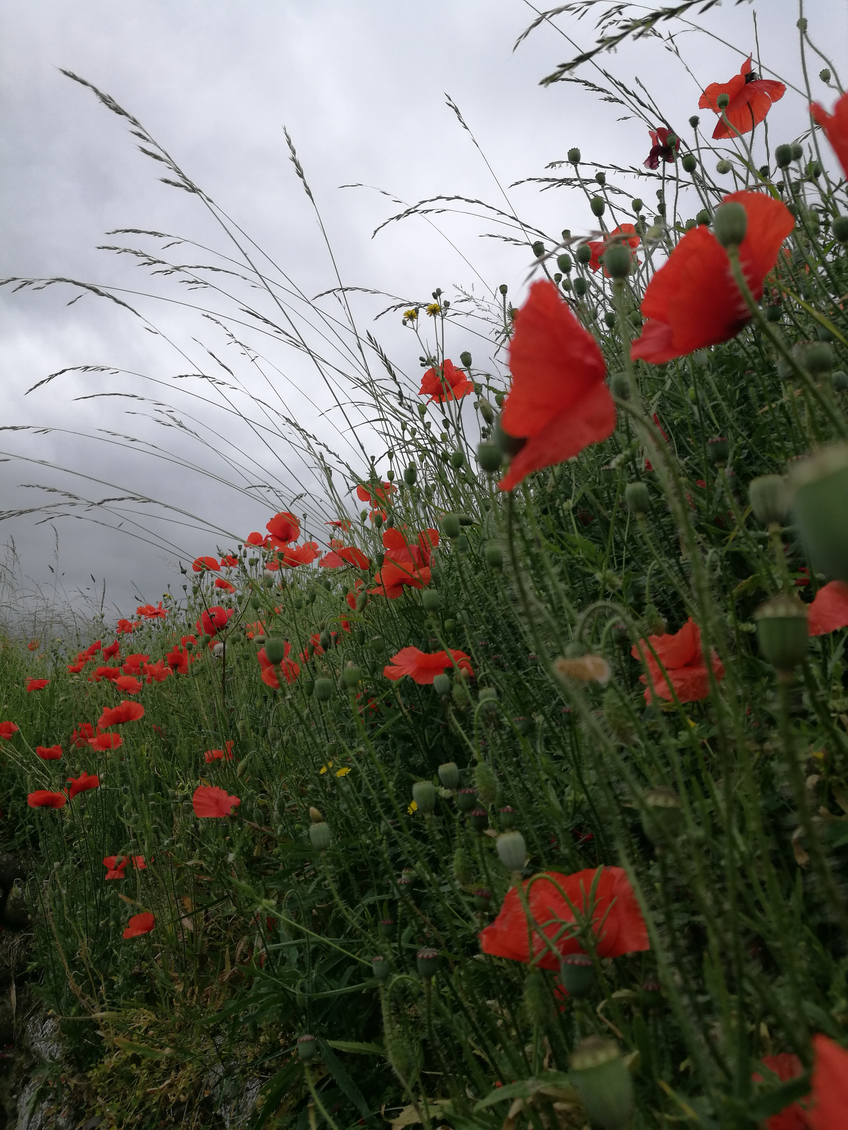 Poppies tussen de loopgraven, Dodengang, Ijzerdijk 62 8600 Diksmuide This photo of immovable heritage has been taken in the Flemish Region